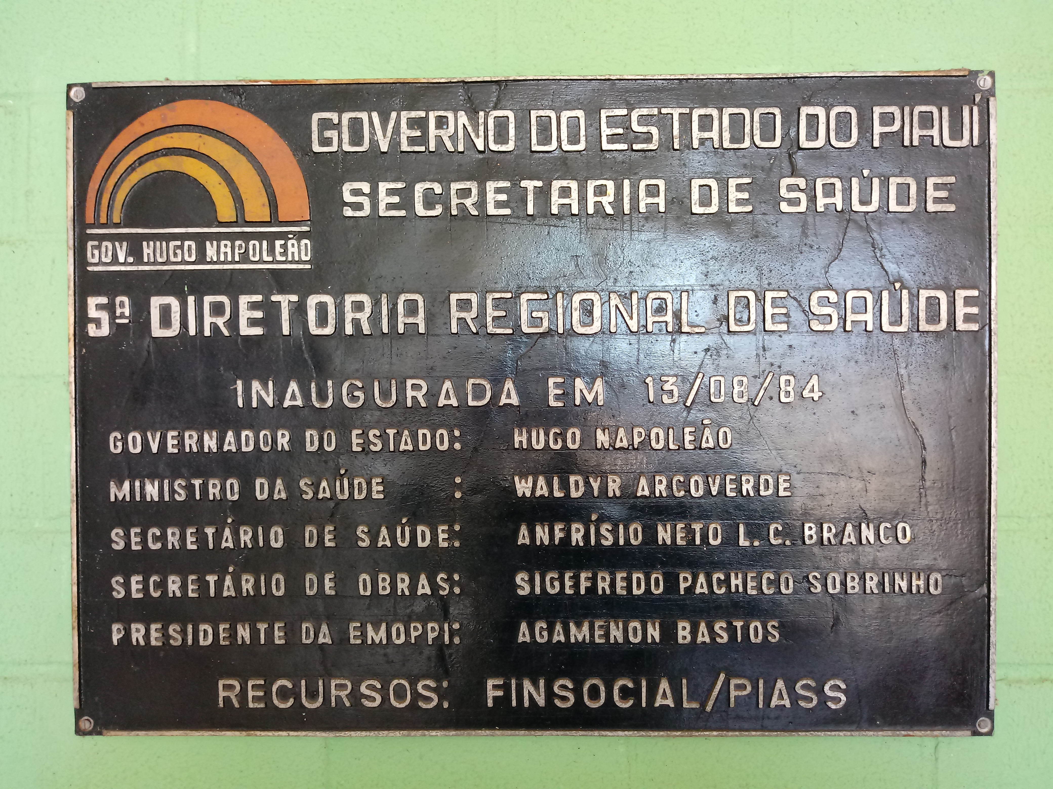 Placa de inauguração da Regional de Saúde em Campo Maior, Piauí.